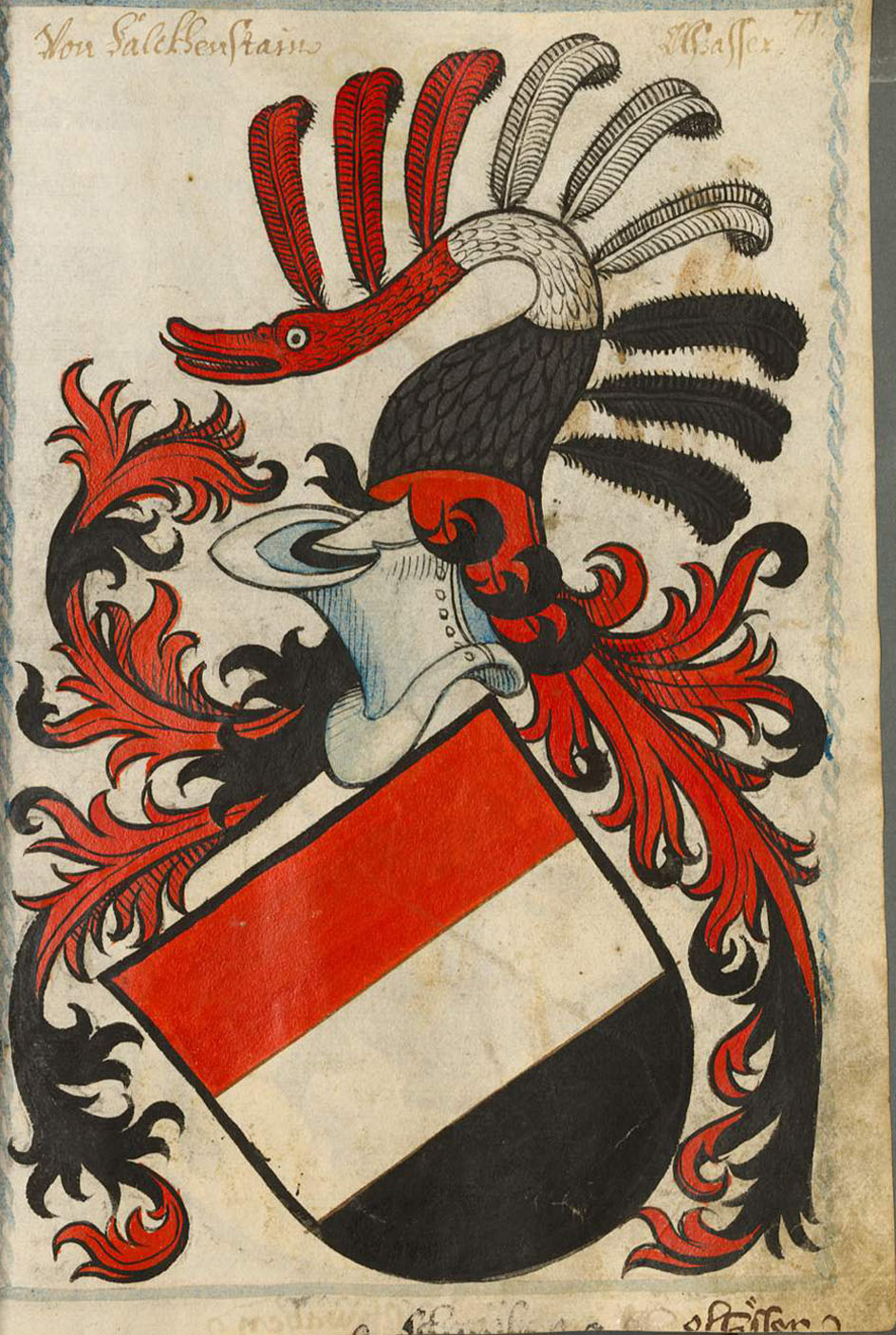 Scheibler'sches Wappenbuch , älterer Teil;Seite 71 Von Falckhenstain Elsasser